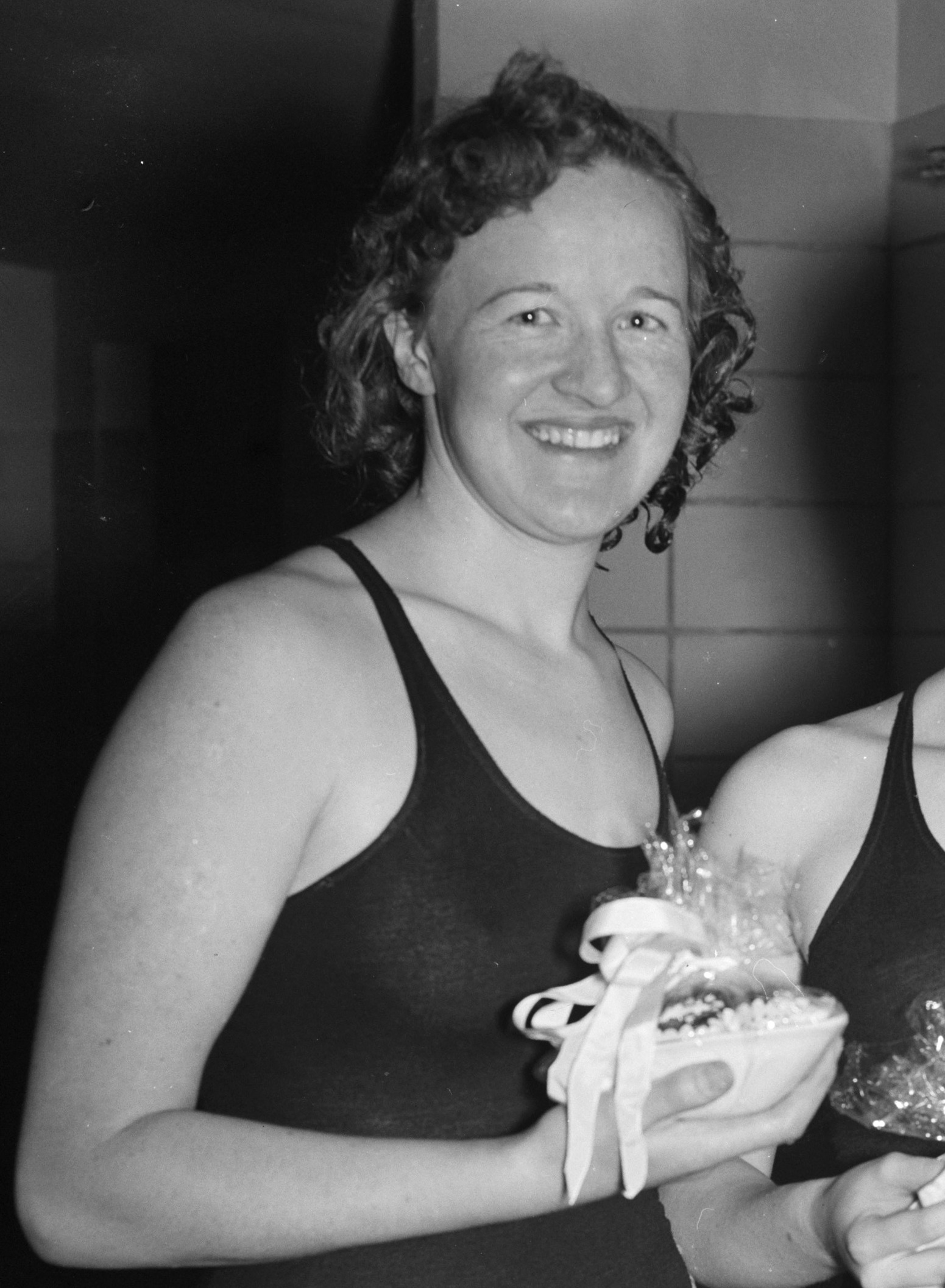 Internationale zwemwedstrijden Zuid Belgie La Louvrere . Van Ekris